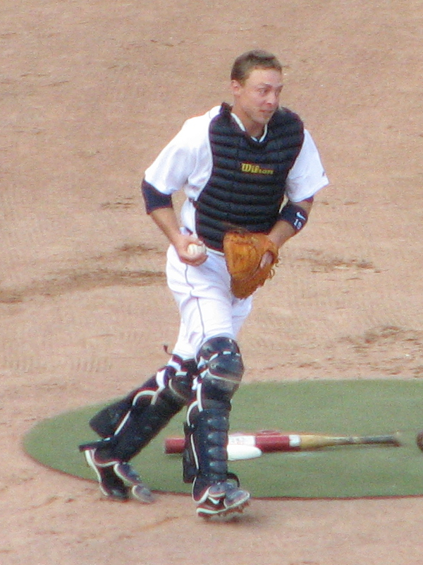 Brandon Inge